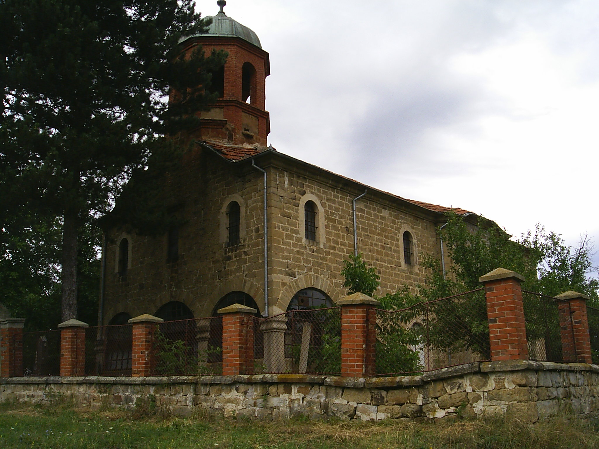 Църквата "Св. Великомъченик Димитрий", Средни колиби, Великотърновско